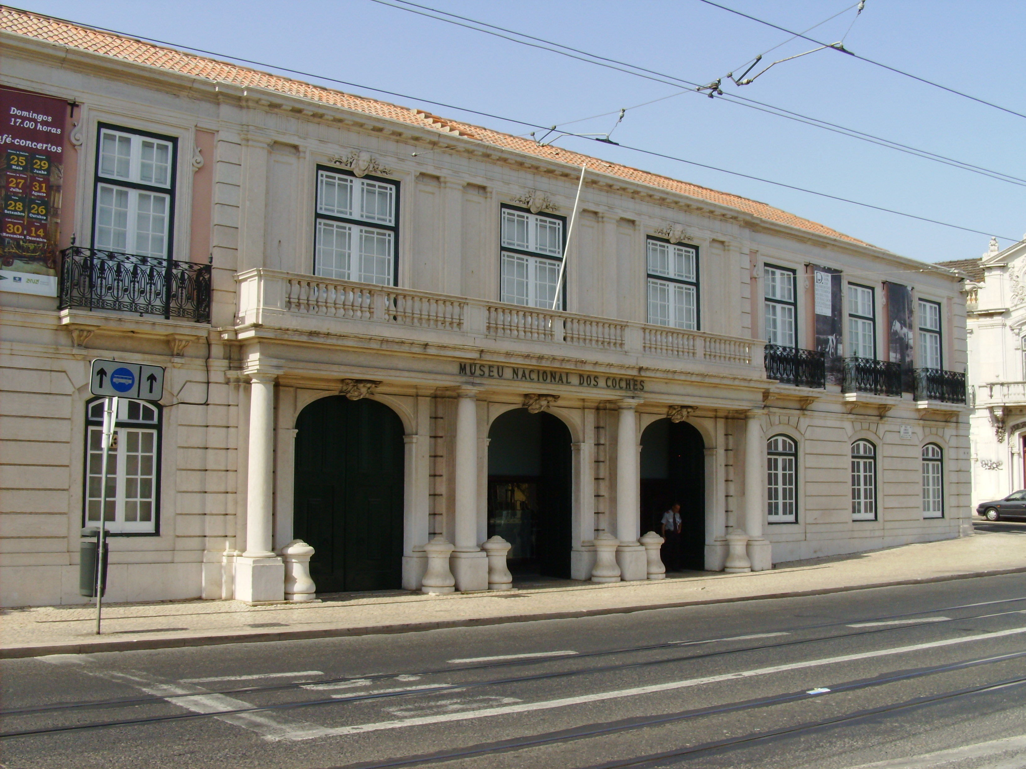 Museu Nacional dos Coches, Lisboa, Portugal: fachada.